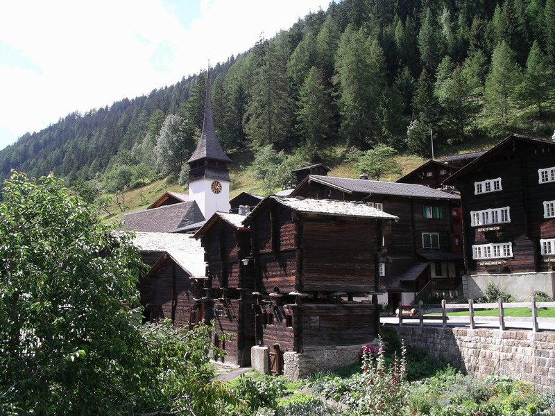 Beschreibung: Niederwald im Wallis Herbst 2004 Quelle: selbst fotografiert Fotograf: Egon Schmidt (für die GNU FDL)